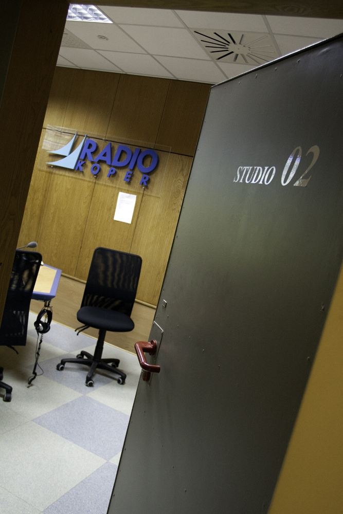 Studi 02 Radia Koper